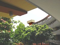 Foto farita de Luis Guillermo Restrepo Rivas, kiun la aŭtoro liveras por publika kaj libera uzado far iu ajn homo aŭ maŝino.